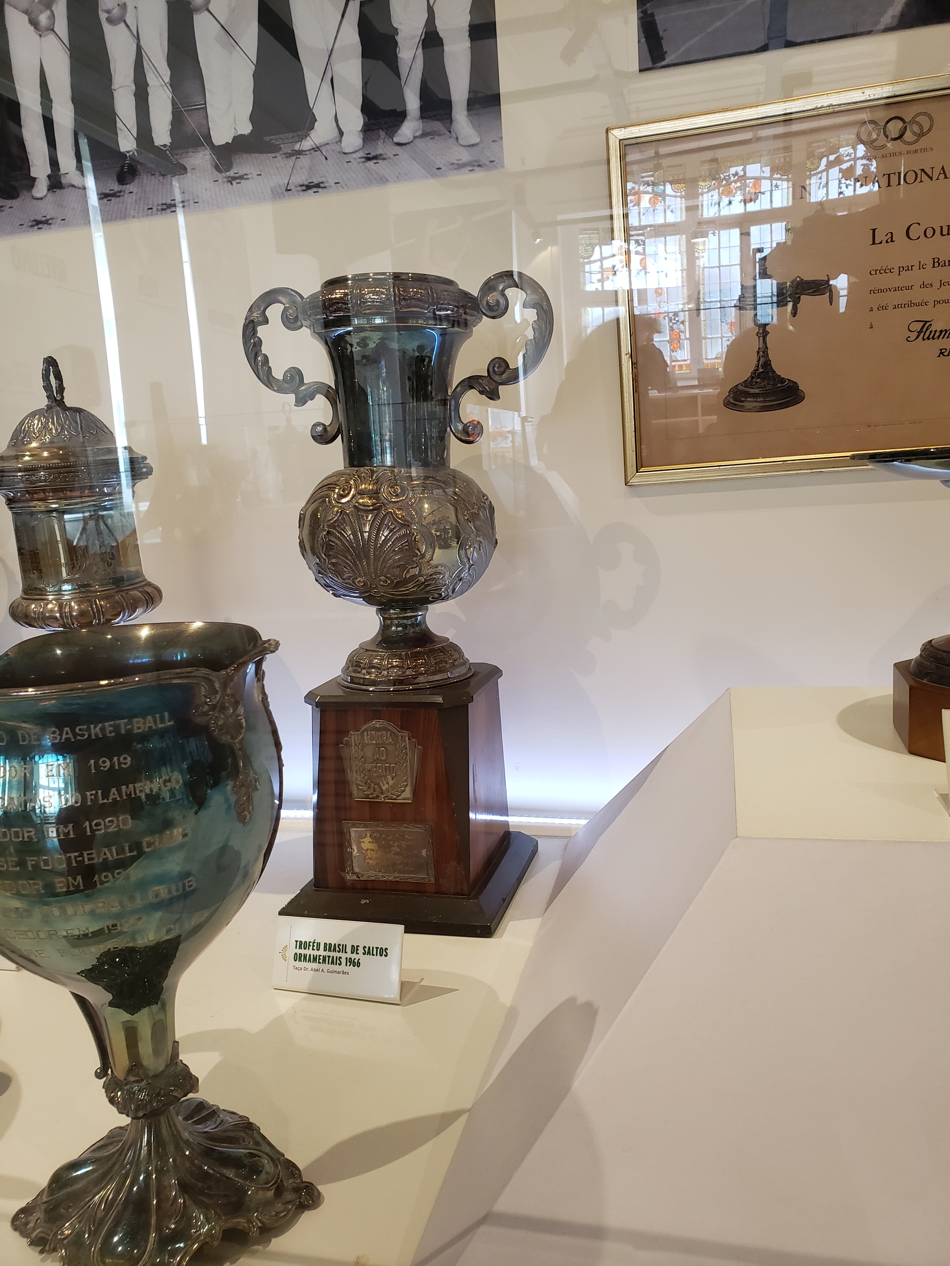 Troféu Brasil de Saltos Ornamentais de 1966 conquistado pelo Fluminense Football Club.